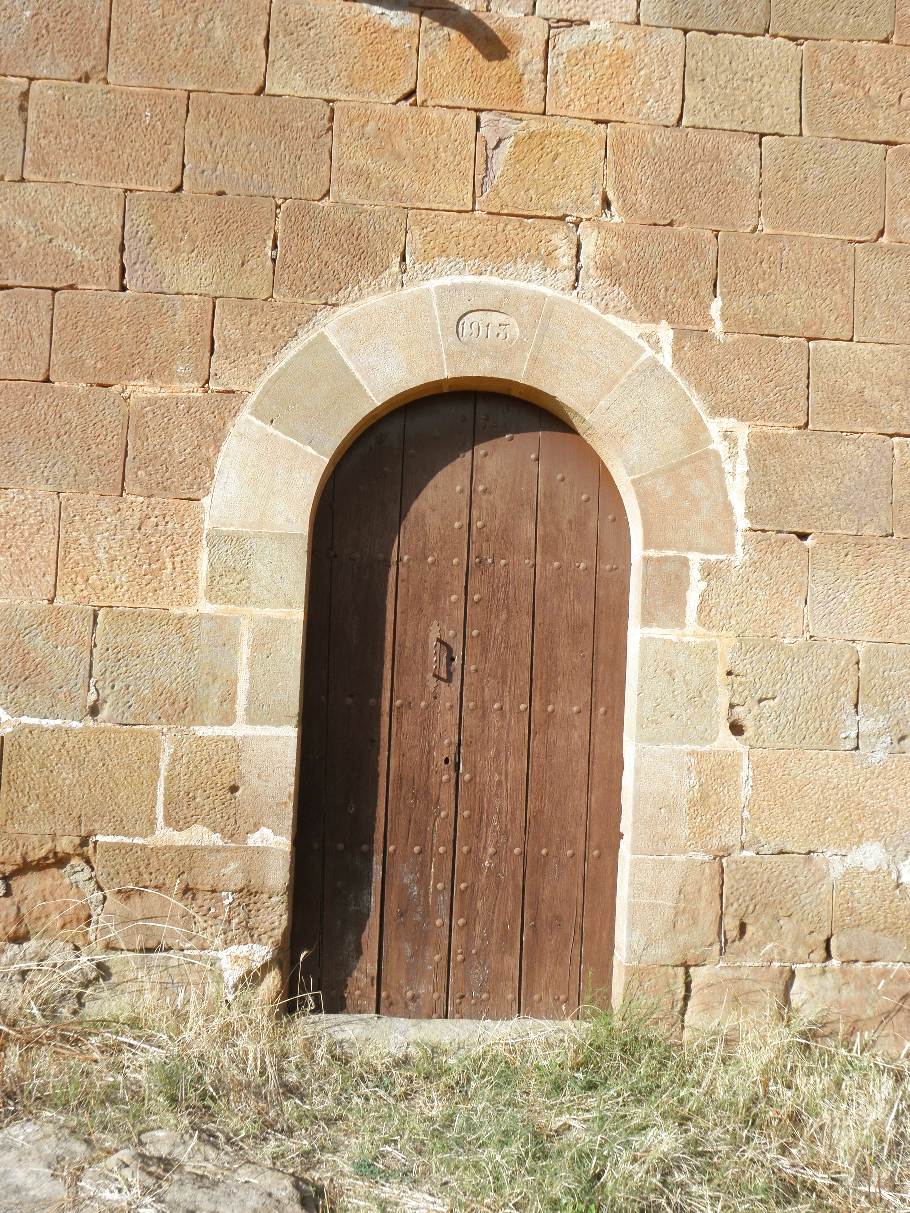 El portal petit de la façana de la rectoria de Sallent de Solsonès, al municipi de Pinell de Solsonès.